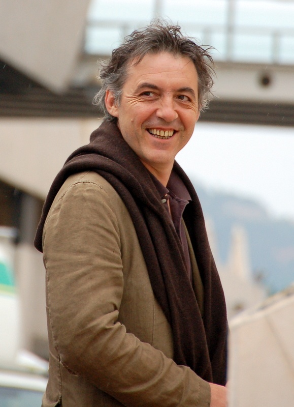 Pascal Caucheteux au festival de Cannes